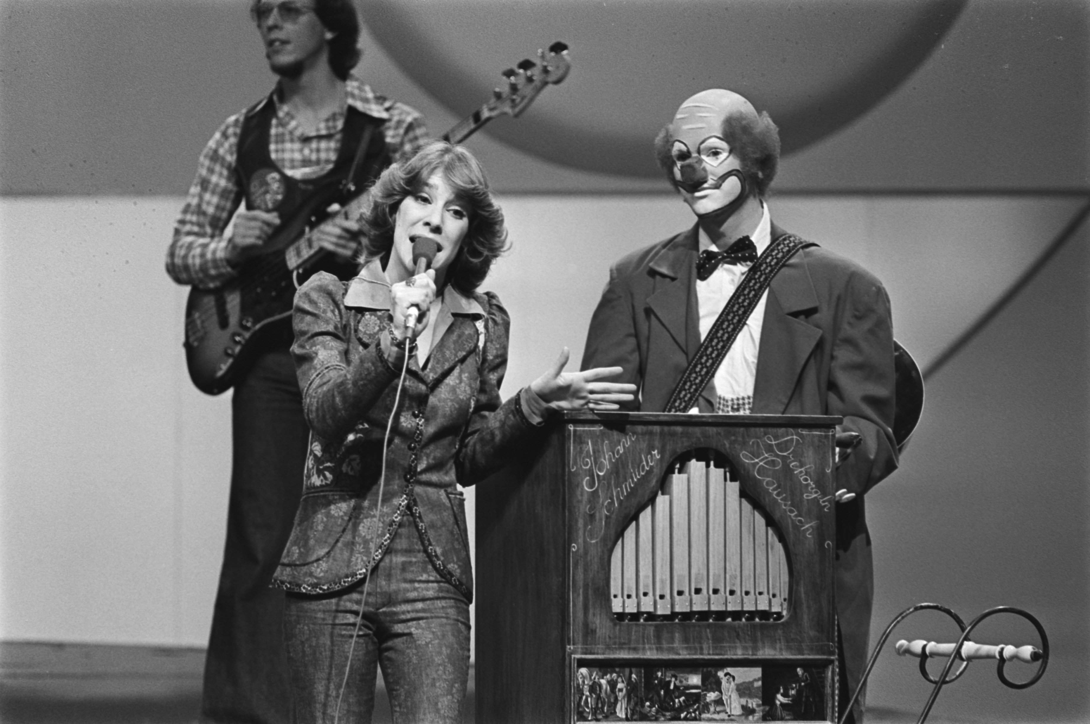 Collectie / Archief : Fotocollectie Anefo Reportage / Serie : [ onbekend ] Beschrijving : Eurovisie Songfestival 76 Den Haag ; Peter, Sue and Marc (Zwitserland) Datum : 3 april 1976 Locatie : Den Haag, Zwitserland Trefwoorden : songfestivals Persoonsnaam : Eurovisie Songfestival, PETER Fotograaf : Mieremet, Rob / Anefo Auteursrechthebbende : Nationaal Archief Materiaalsoort : Negatief (zwart/wit) Nummer archiefinventaris : bekijk toegang 2.24.01.05 Bestanddeelnummer : 928-5030